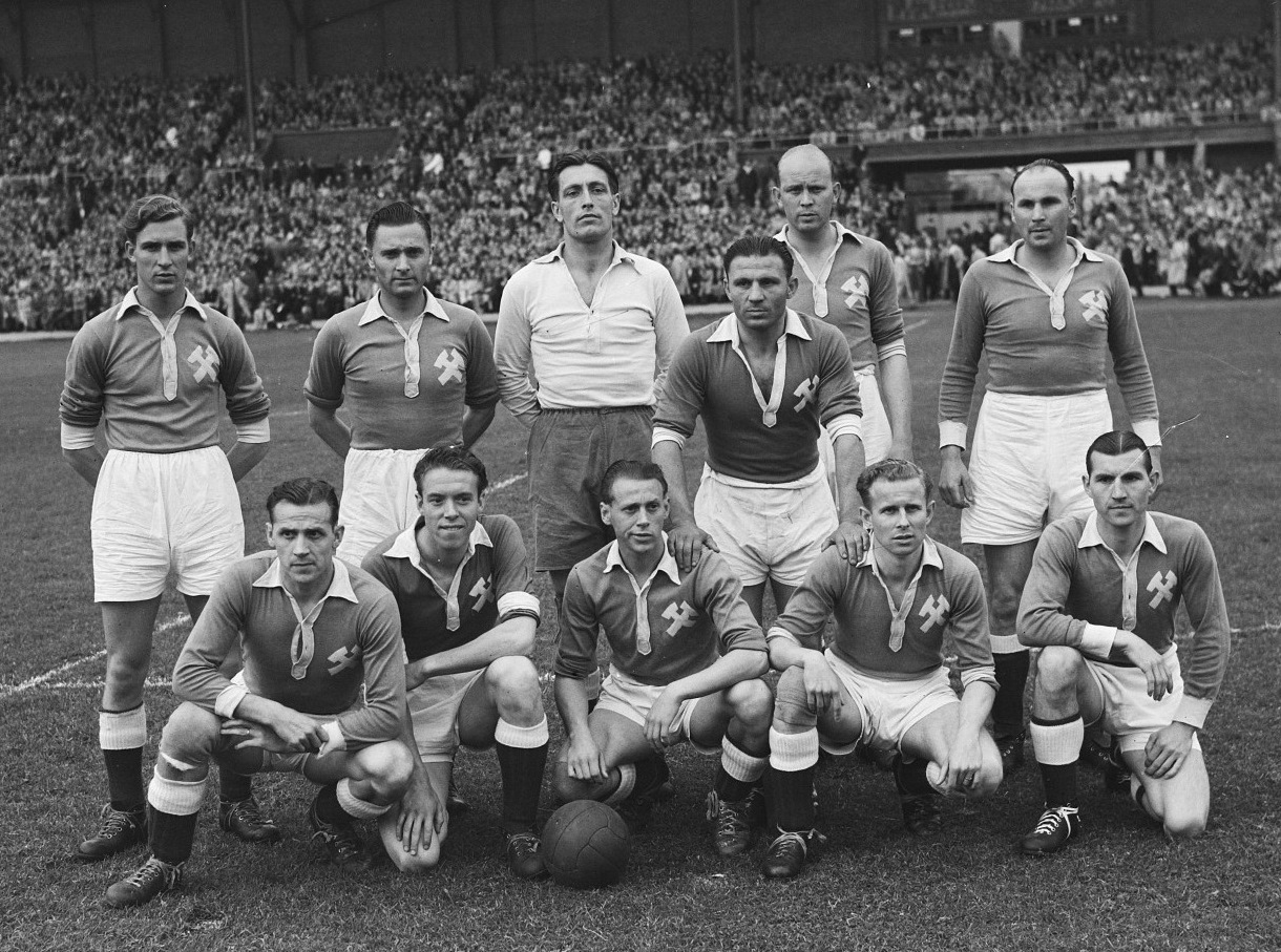 Ajax tegen Limburgia. Limburgia elftal.Staand vlnr: Mathieu Spanjer, Hub Welzen, Sjra Jacobs, Willy Groen (aanvoerder), Jan van Huizen, Hens van Lübeck; zittend vlnr: Frits Cox, Piet Bruist, Lei Cox, Frits de Graaf, Nelis van Lübeck.